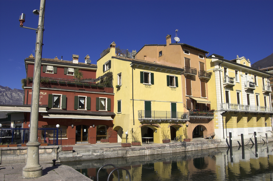 Lago di Garda, Malcesine